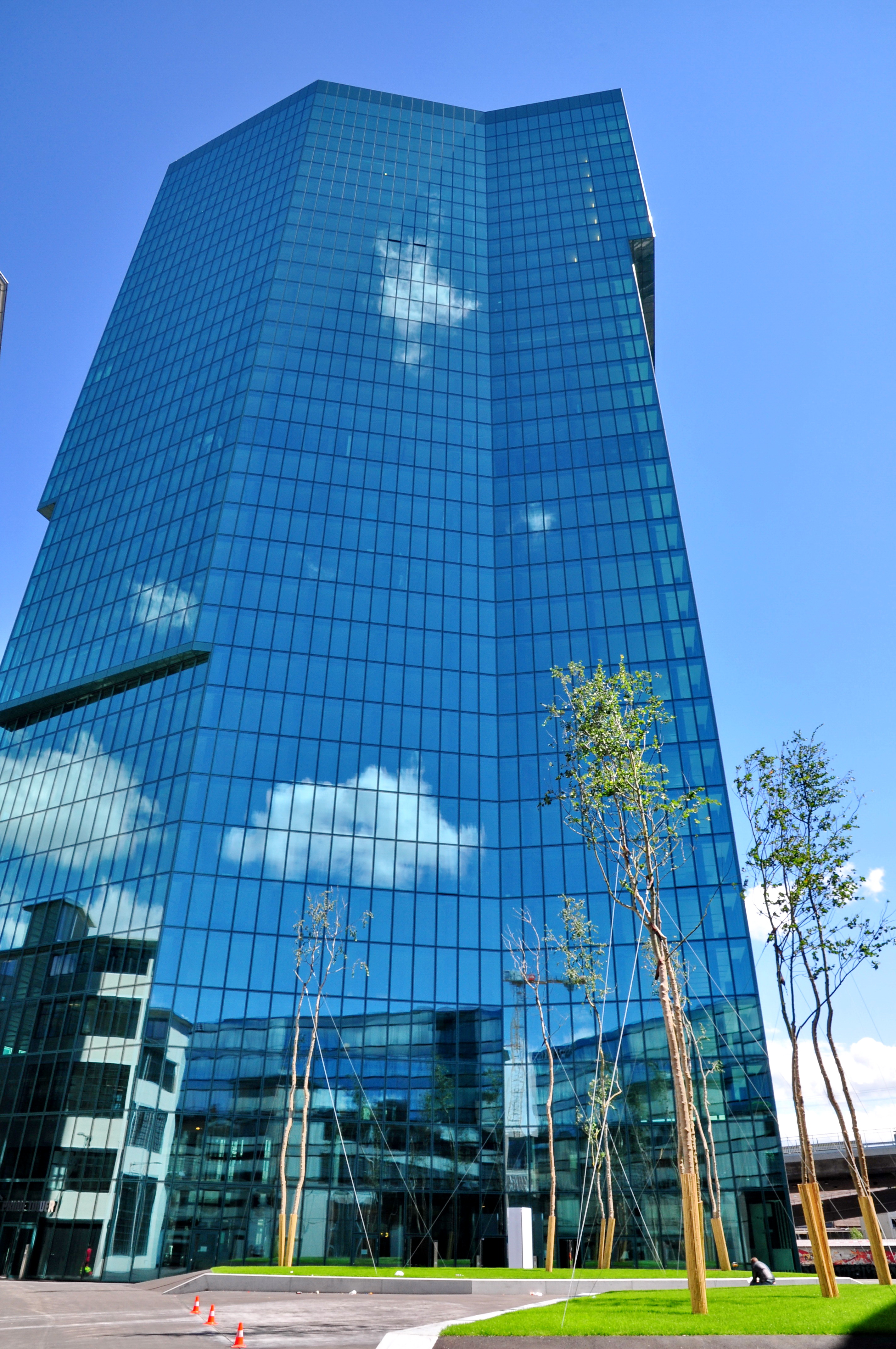 Prime Tower in Zürich-West (Switzerland)